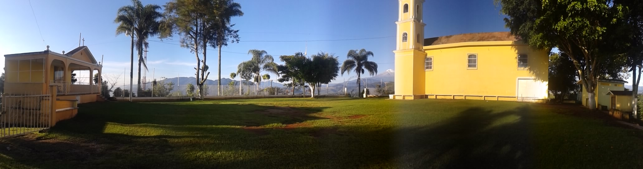 Atrio en el cerrito de Guadalupe